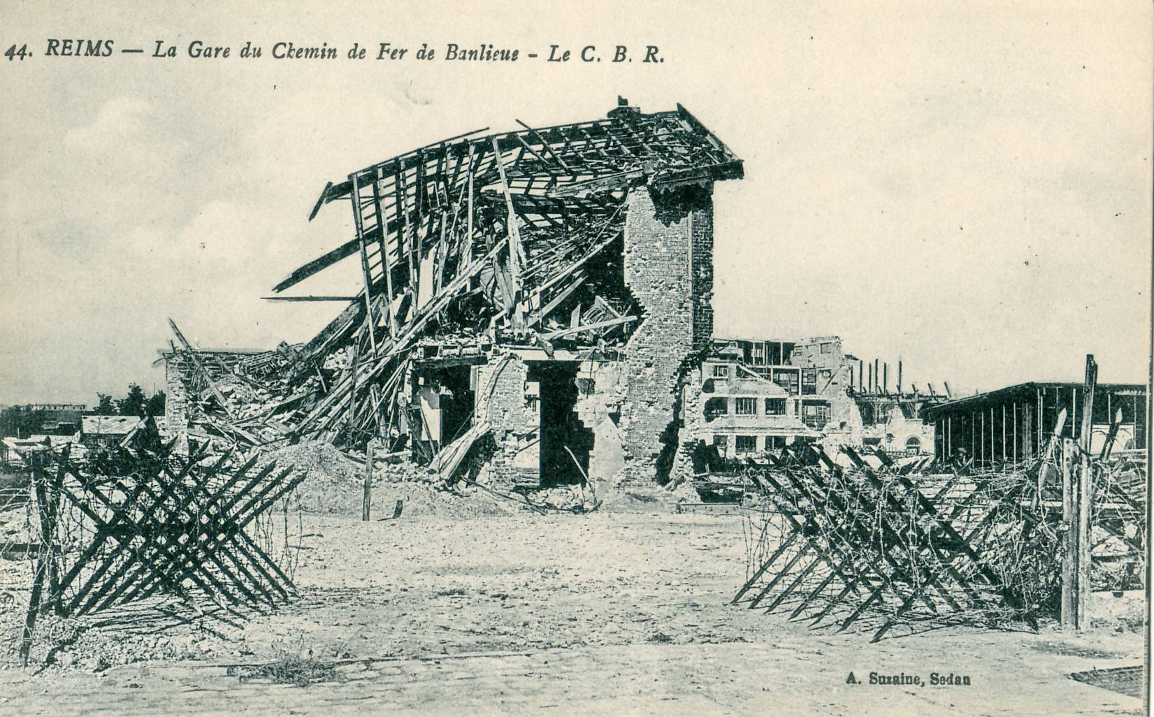 Carte postale ancienne éditée par Suzaine à SedanREIMS : La gare du Chemin de fer de Banlieue - Le C. B. R.